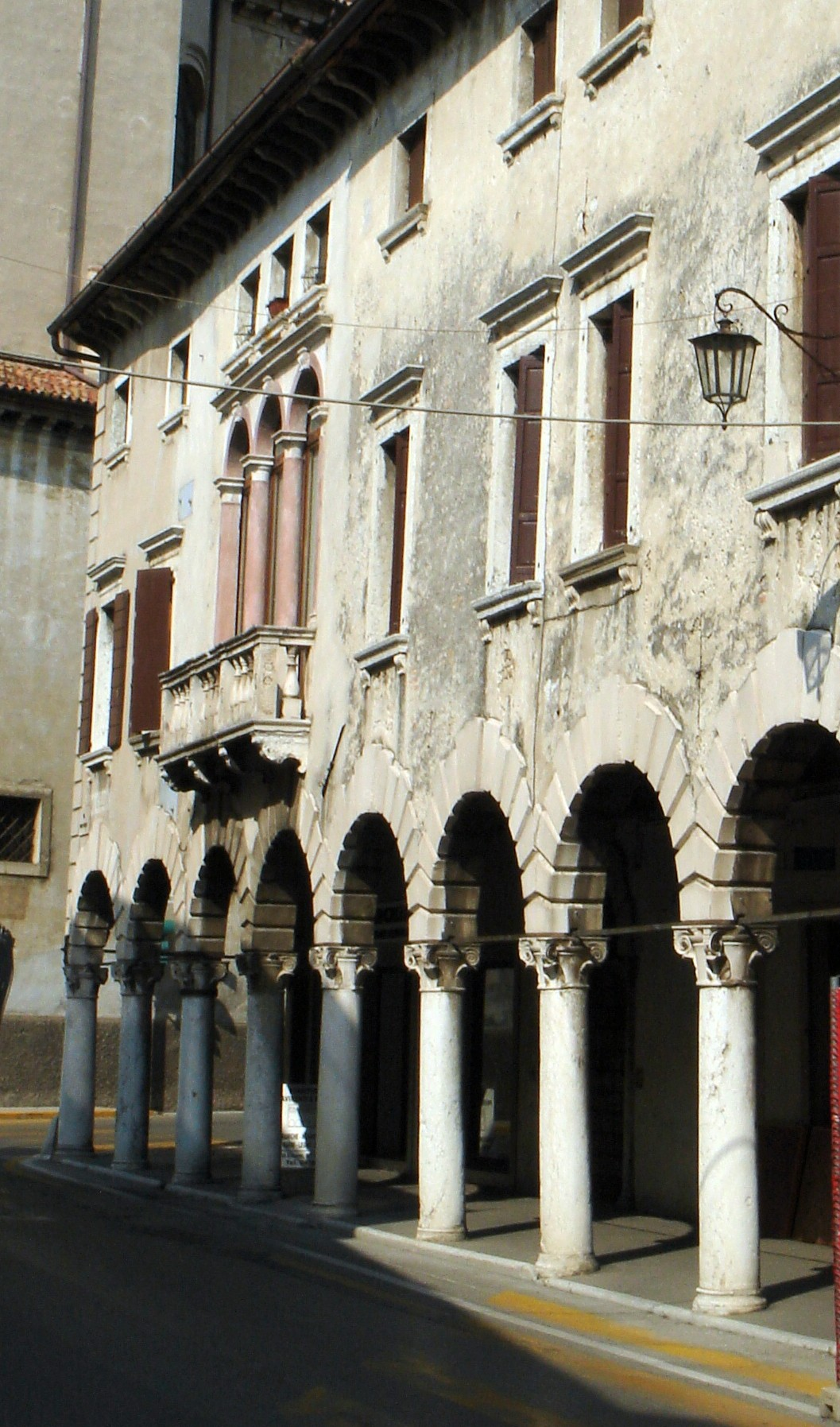 Serravalle di Vittorio Veneto (Treviso): Palazzo Galletti.